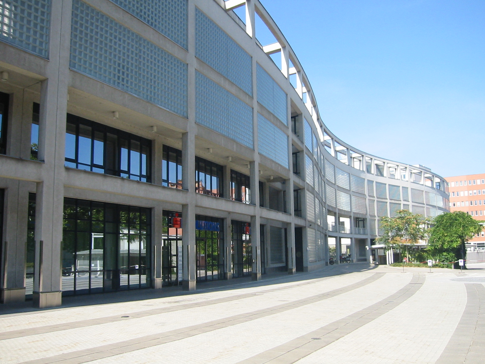 s IT Solutions Firmengebäude in Wien Simmering